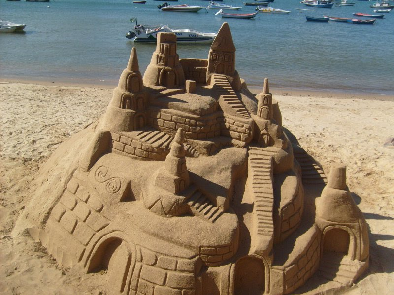 Castelo de areia